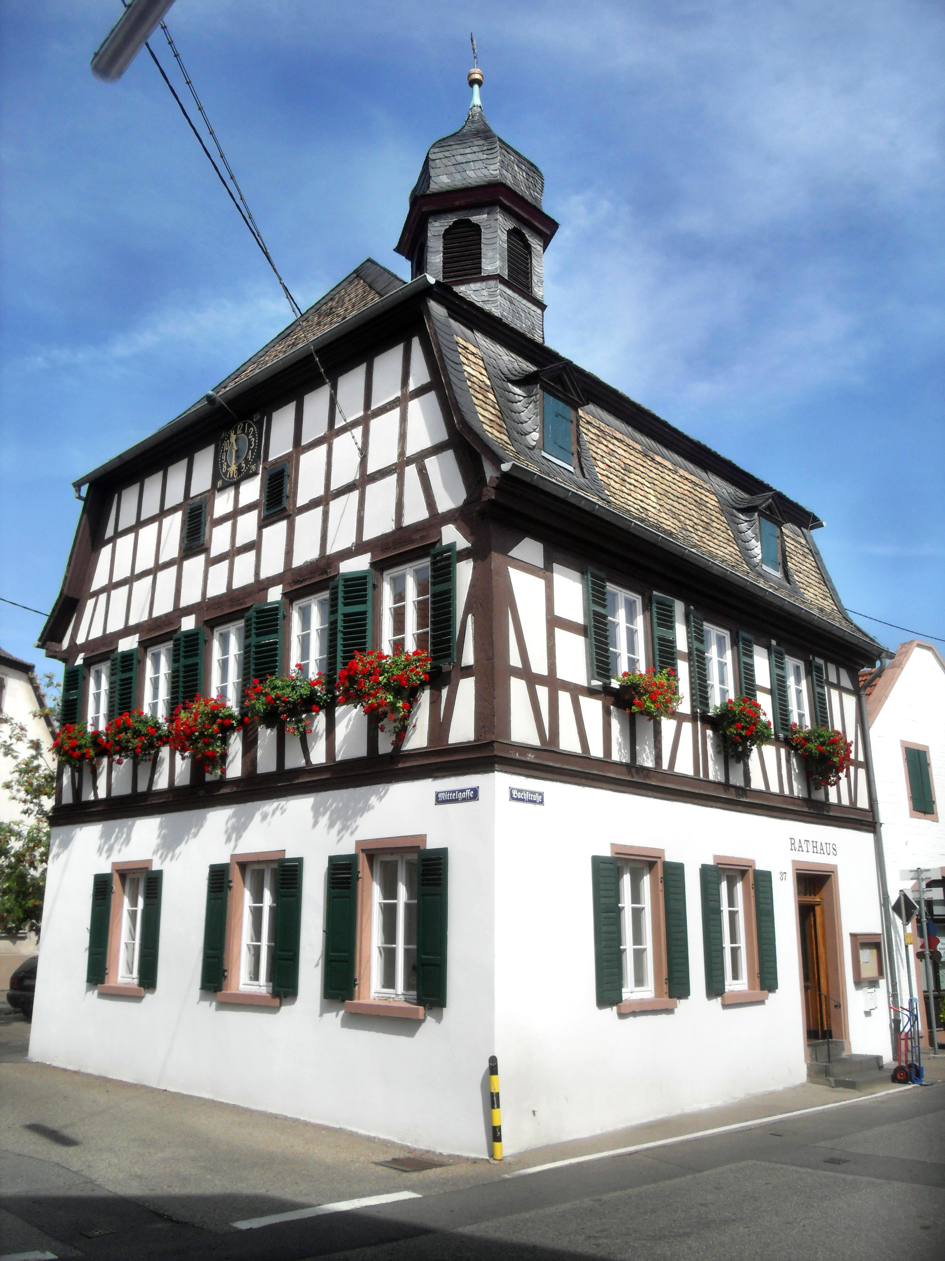 Das Alsheimer Rathaus (Deutschland)